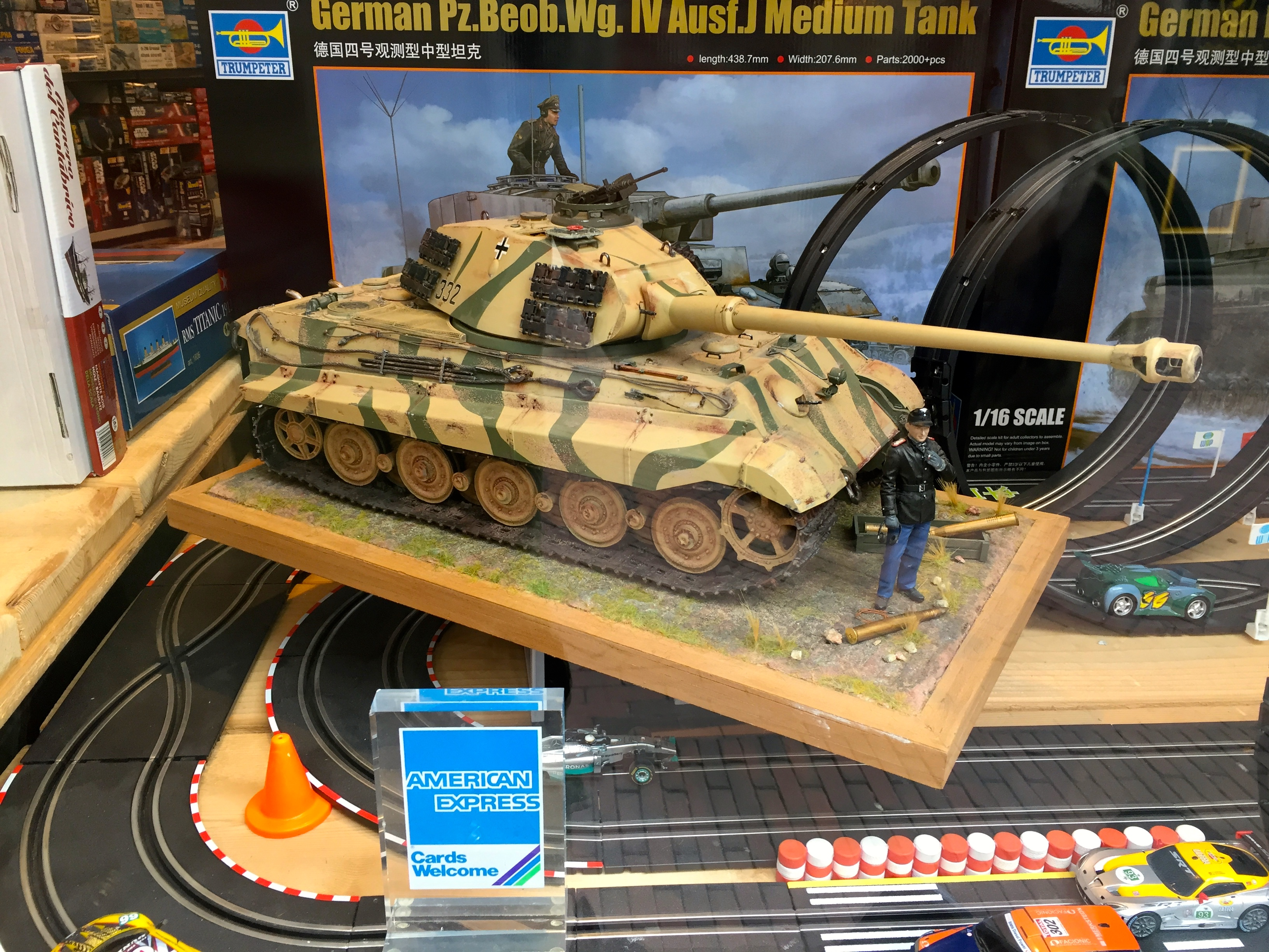 De Panzerkampfwagen IV (Pz.Kpfw. IV) Sd.kfz 161, algemeen bekend als de Panzer IV, was een medium tank ontwikkeld in nazi-Duitsland in de late jaren 1930 en op grote schaal gebruikt tijdens de Tweede Wereldoorlog. Oorspronkelijk ontworpen als een infanterieondersteuningstank. The Panzerkampfwagen IV (Pz.Kpfw. IV) Sd Kfz 161, commonly known as the Panzer IV, was a medium tank developed in Nazi Germany in the late 1930s and used extensively during the Second World War. Its ordnance inventory designation was Sd.Kfz. 161. Designed as an infantry-support tank. Bron